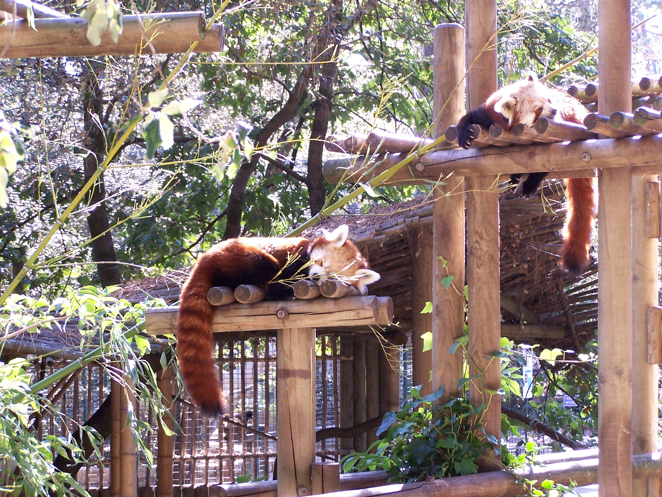 Photographie de deux petits pandas (Ailurus fulgens fulgens) prise au Zoo de la Palmyre. Le petit panda est un mammifère principalement végétarien originaire de l'Himalaya et de la Chine méridionale. Son aire de répartition est vaste : elle couvre à l'ouest certaines parties de l'Himalaya (Népal, Bhoutan et Tibet) et, à l'est, le nord de la Birmanie et les provinces chinoises du Sichuan et du Yunnan. À l'instar des pandas géants avec lesquels ils partagent de nombreux territoires, les petits pandas mangent de grandes quantités de bambous, mais leur régime alimentaire comprend également des fruits, des racines, des glands et du lichen. Ces animaux paisibles sont d'excellents grimpeurs qui s'alimentent en grande partie dans les arbres, et passent la plupart de leur temps à manger et dormir. L'espèce est actuellement en danger, en grande partie en raison de la réduction de son habitat, mais aussi à cause d'un important braconnage. Elle figure sur la liste rouge de l'Union internationale pour la conservation de la nature (IUCN).